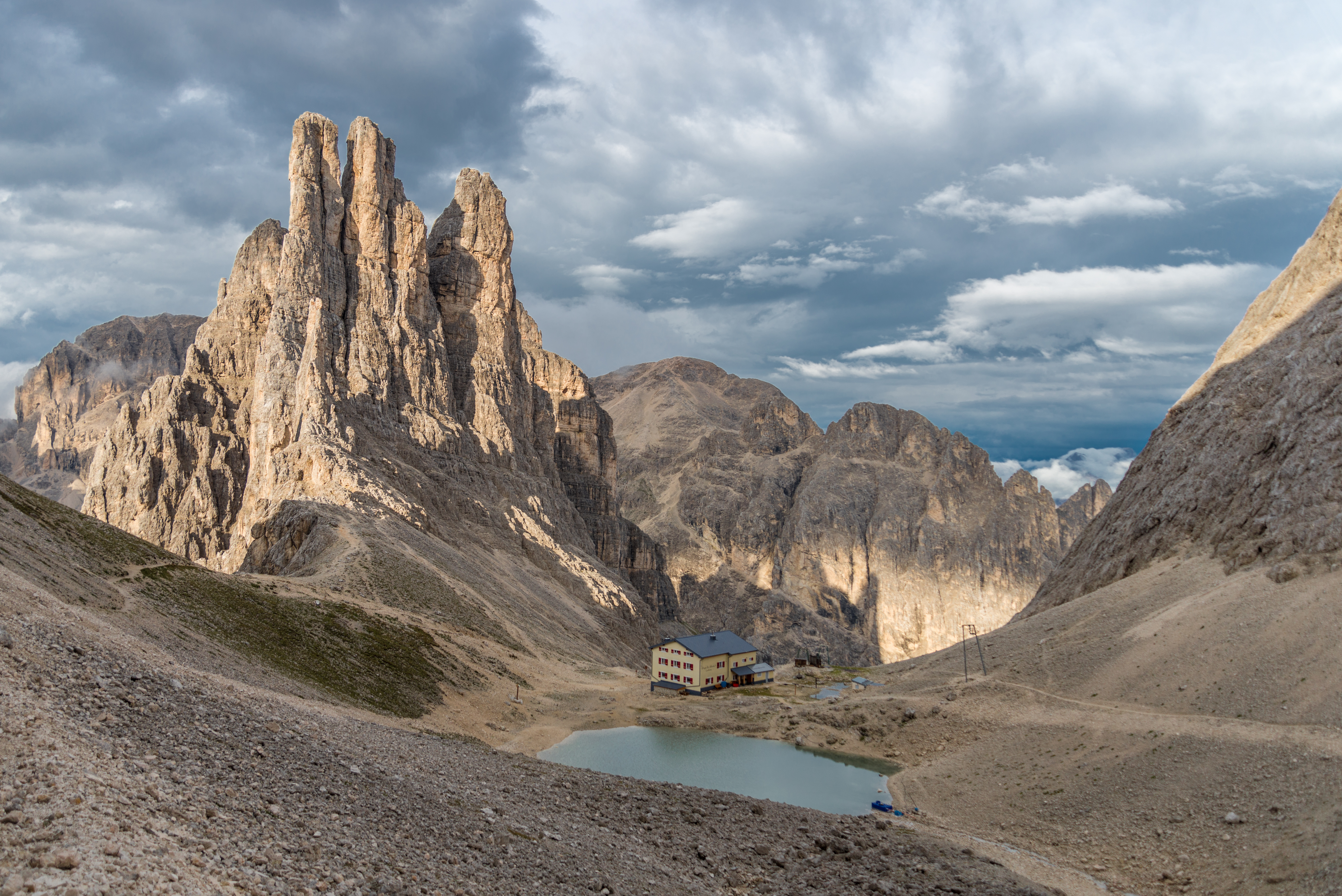 Parco naturale dello Sciliar-Catinaccio, la vista al rifugio Re e Torri del Vajolet